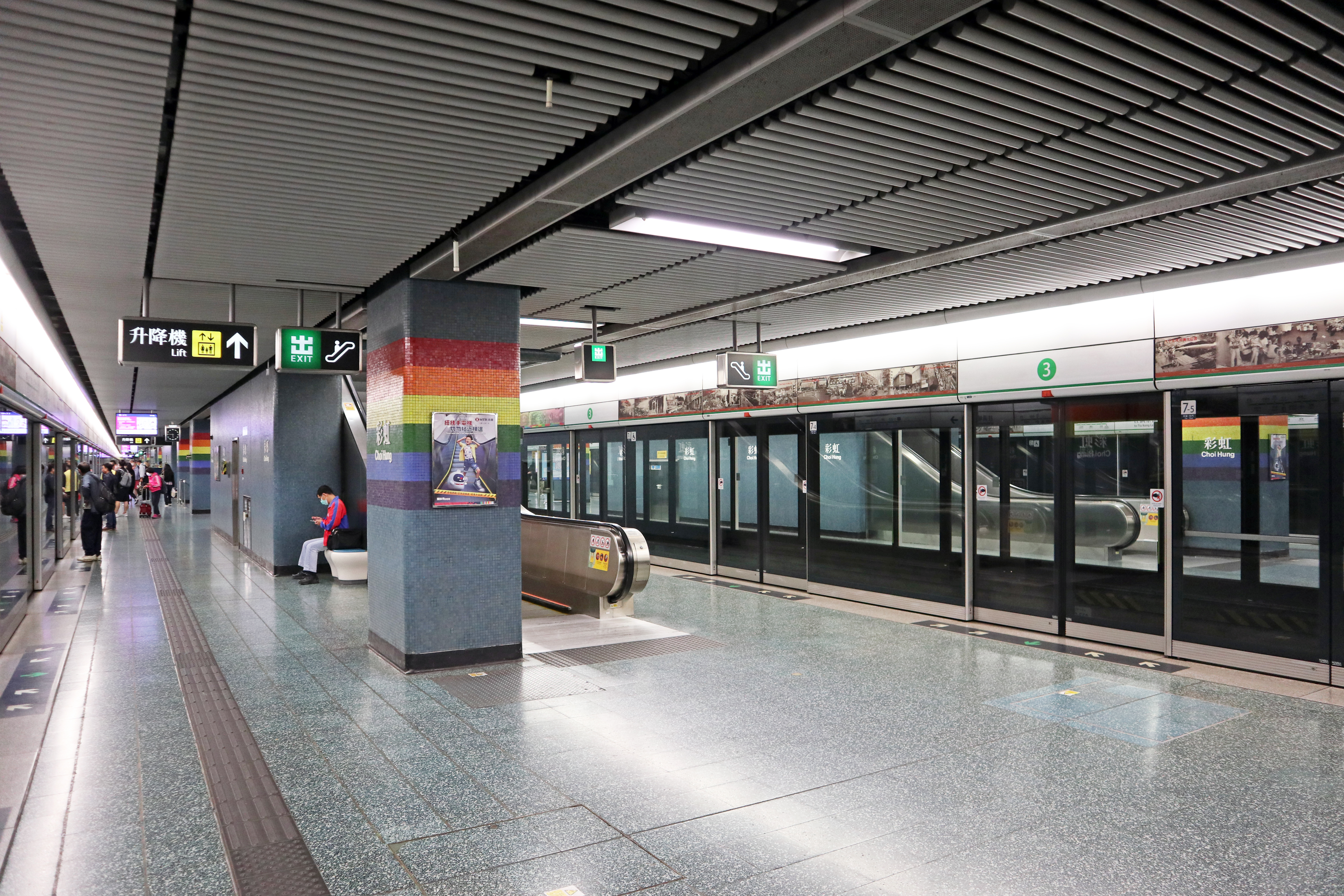 港鐵彩虹站月台